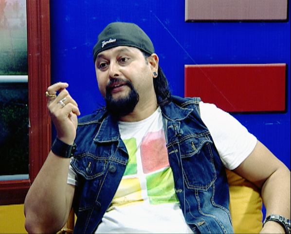 नेपाली: Ramit Dhungana, Nepali